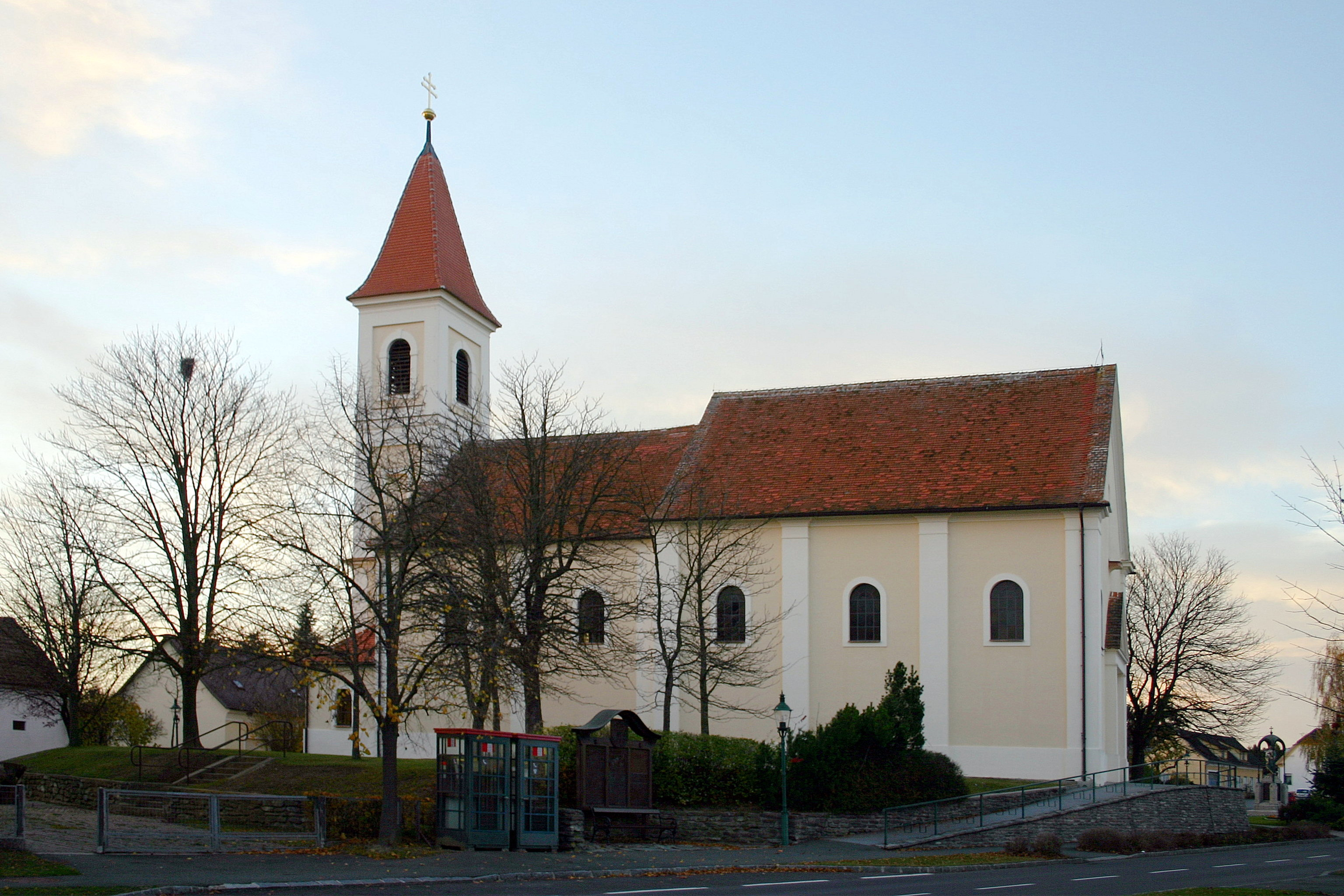 Sankt Michael im Burgenland römisch-katholische Pfarrkirche